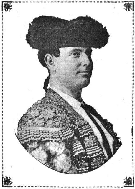 José Rodríguez, Pepete. "El Enano. Revista de Loterías y Toros", 20 de octubre de 1895